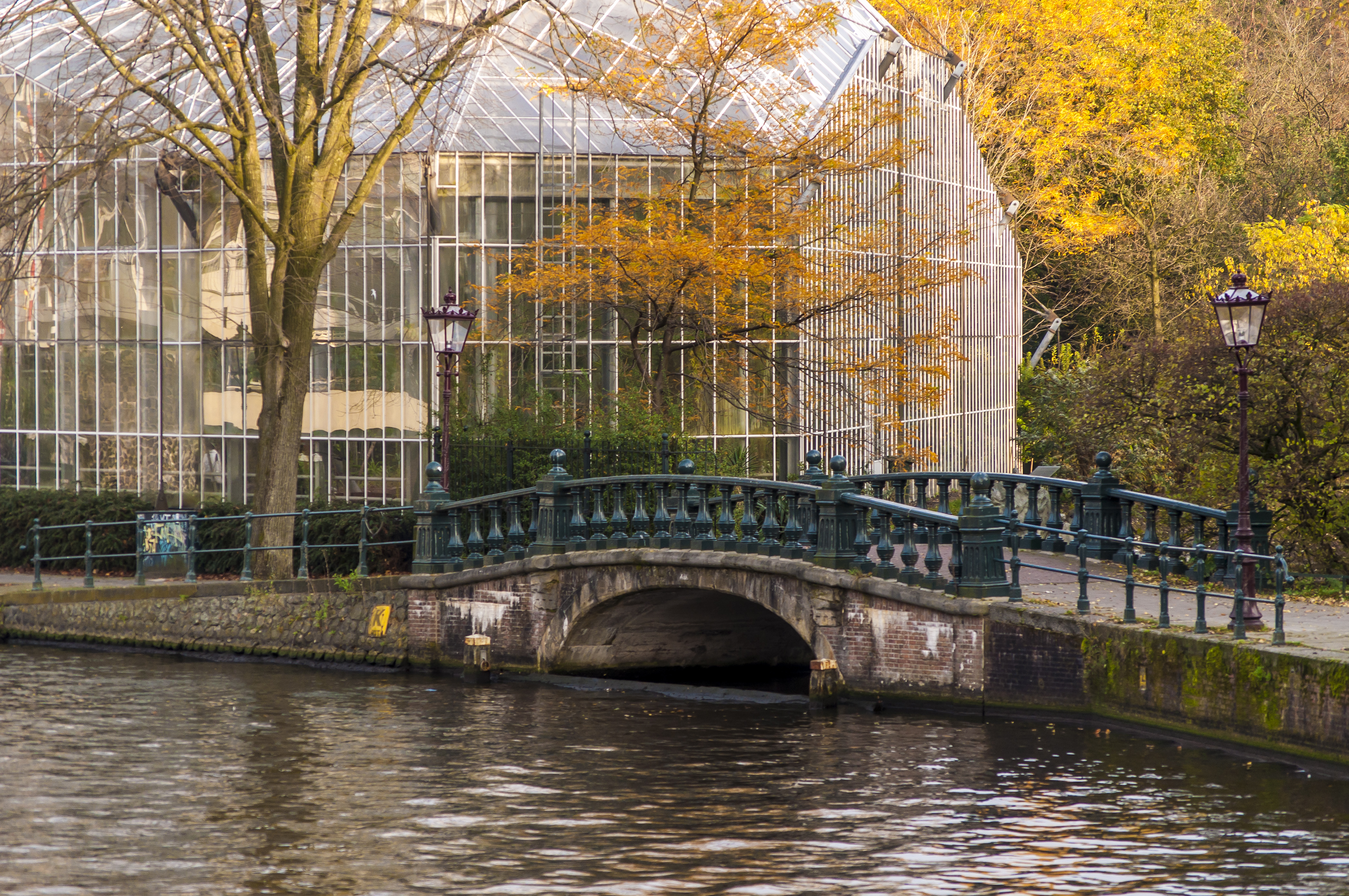 Hortus Botanicus Amsterdam, Toegangsbrug West, Steen; in 2016 nieuwe naam: Johan van Hulstbrug